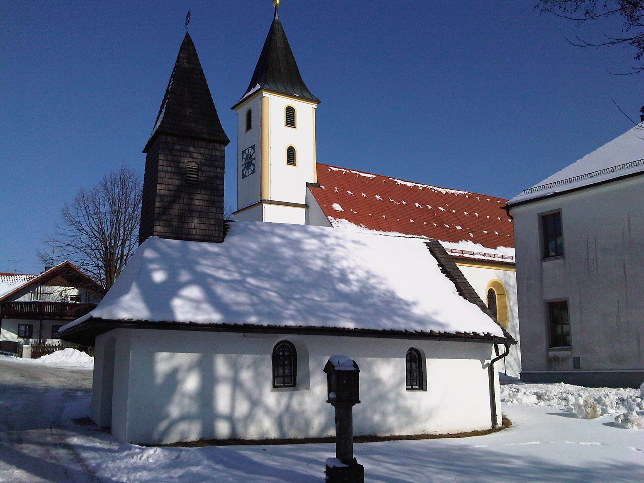 Gnadenkapelle Unseren Lieben Frau ("Frauenbrünnl") in Heilbrunn, Gmd. Wiesenfelden; Im Hintergrund Wallfahrtskirche St. Magdalena 23″ N, 12° 33′ 56.36″ E